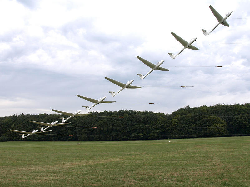 Studie eines Windestartes